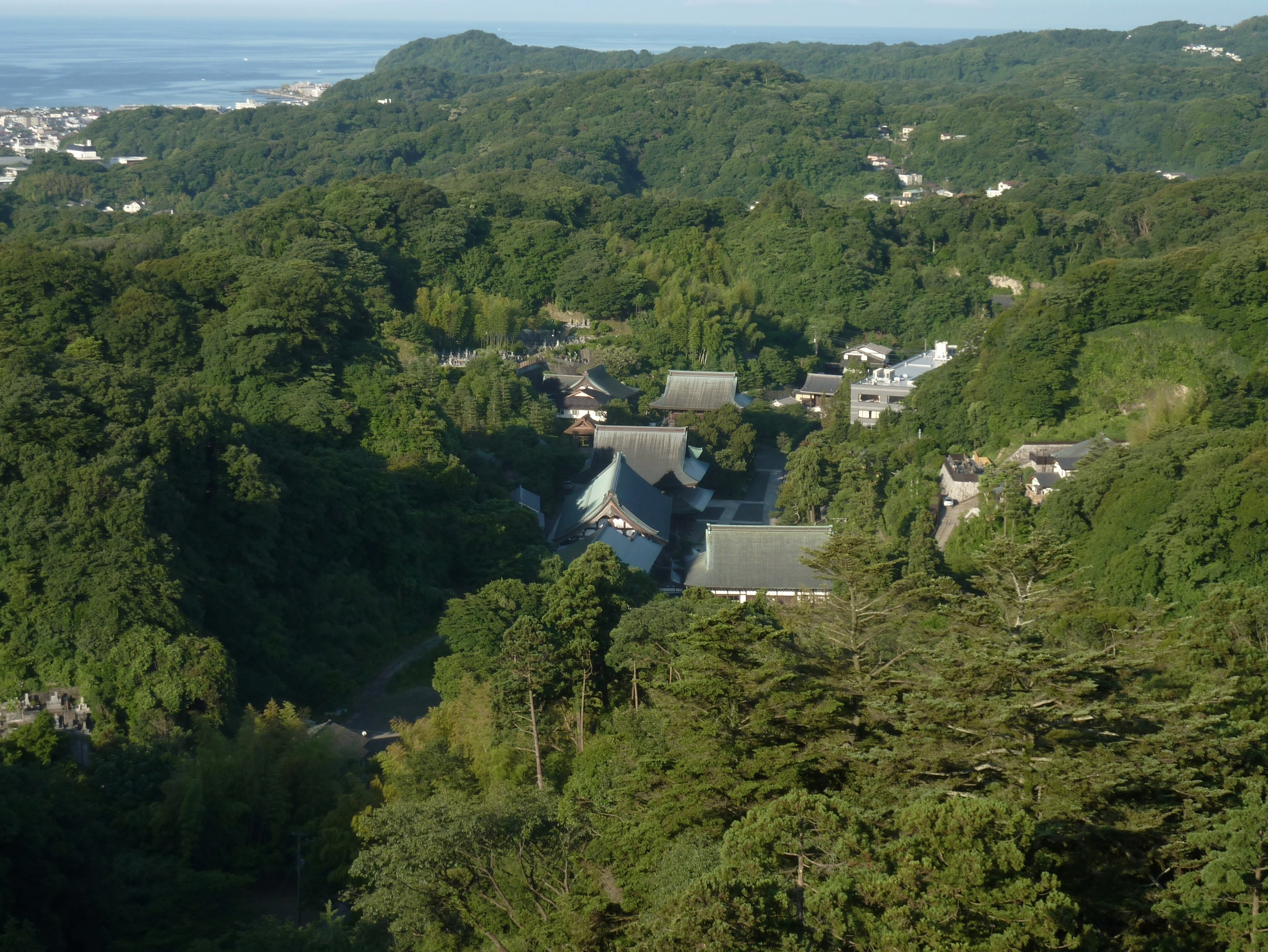 天園ハイキングコース・勝上献より臨む早朝の建長寺 / 神奈川県鎌倉市